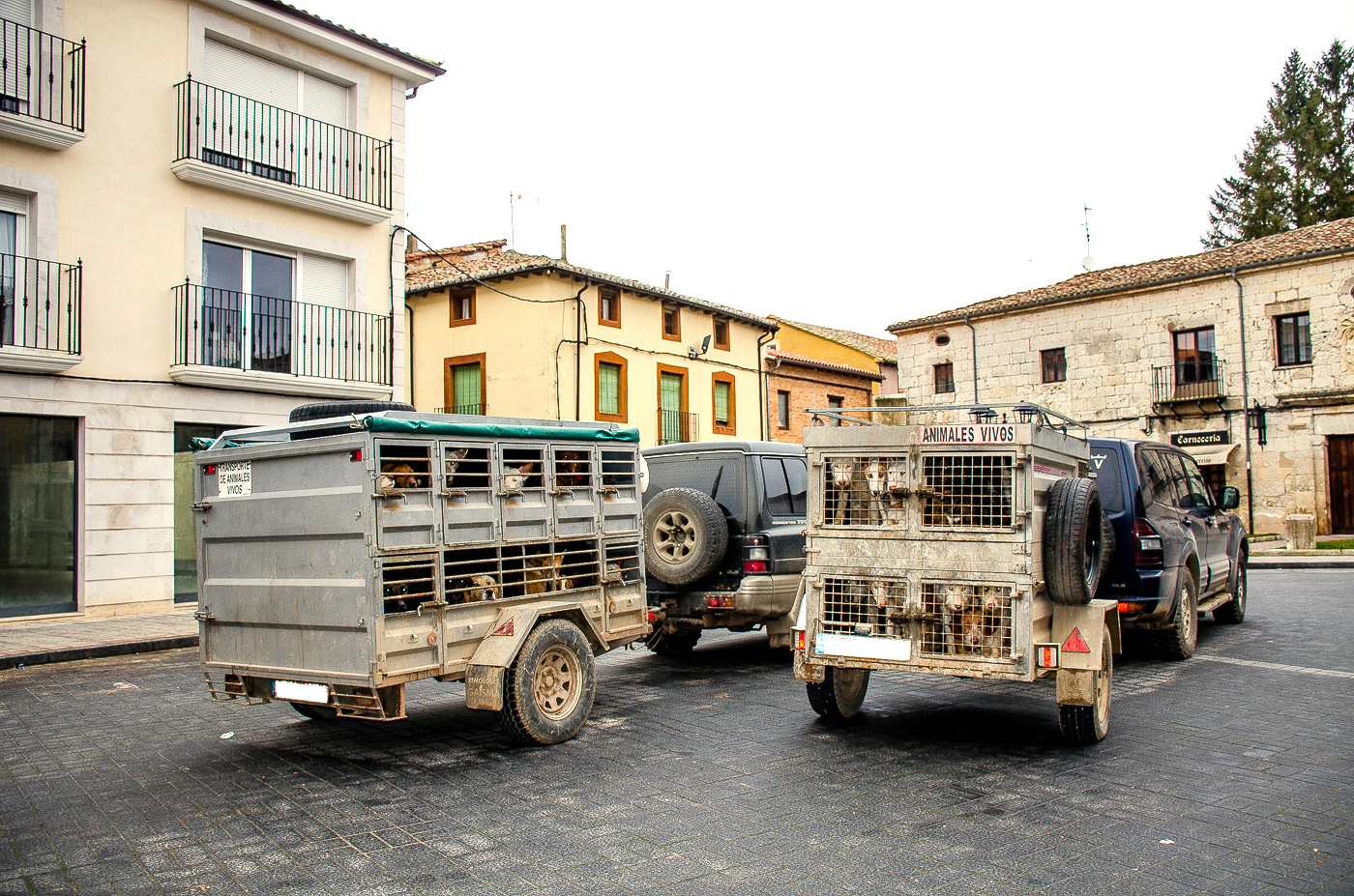 Perros de rehala, esperando en Villadiego para una montería.